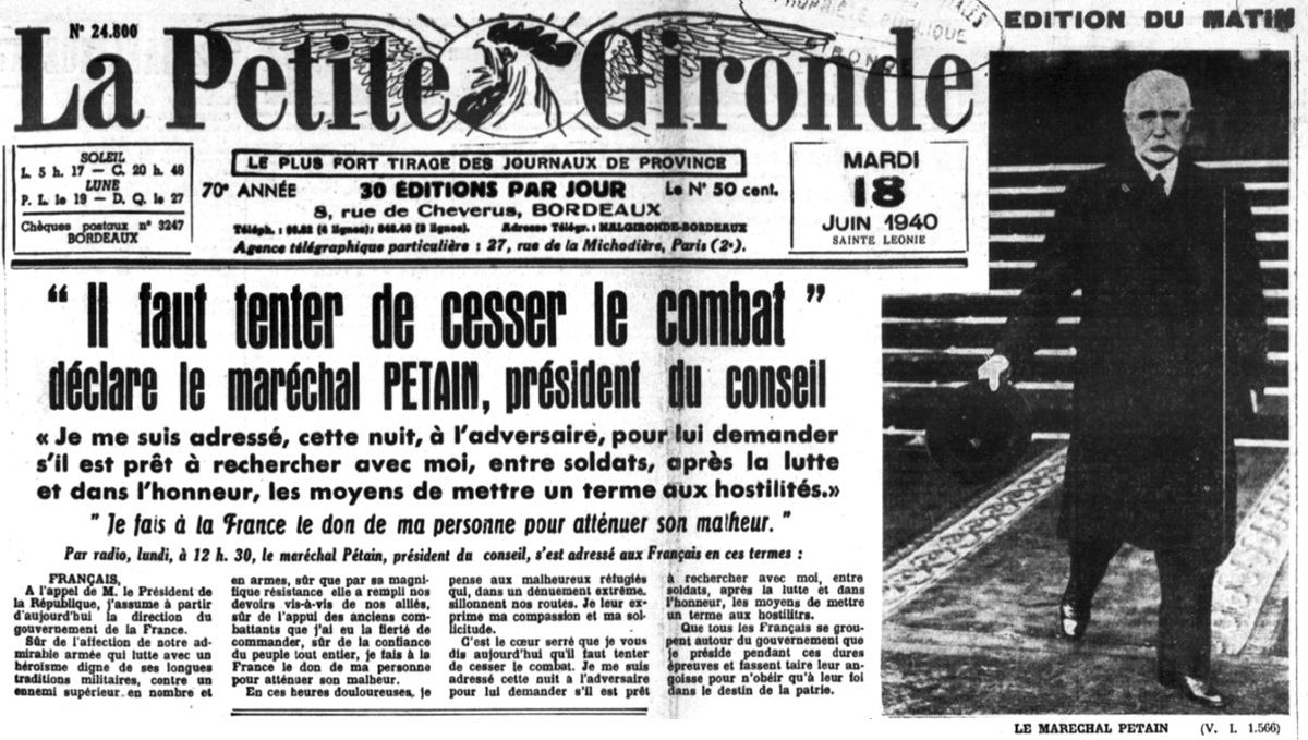 Pétain demandant de "cesser les combats" le 17 juin 1940 (une de La Petite Gironde, 18 juin 1940).